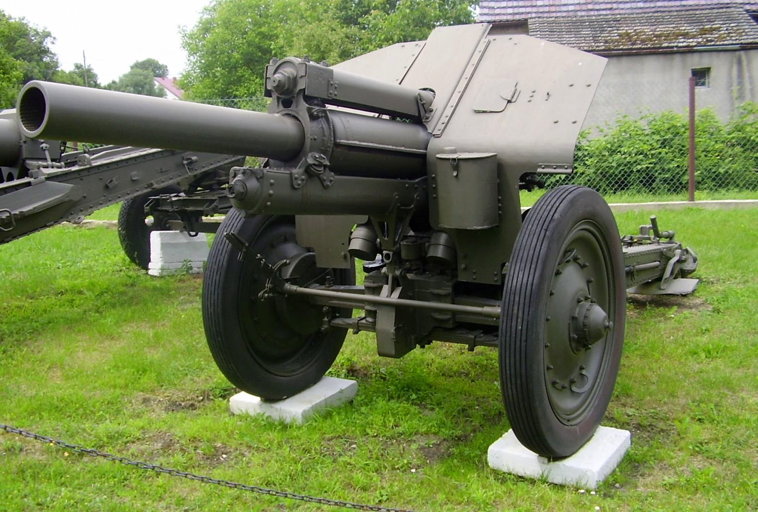 122 mm haubica wz. 1938 (M-30)